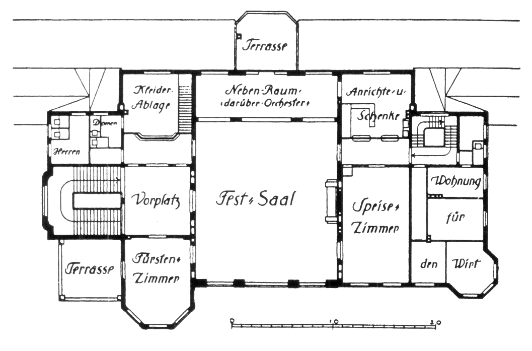 Münchner Haupt’ in Obersendling, Grundriss des Obergeschosses